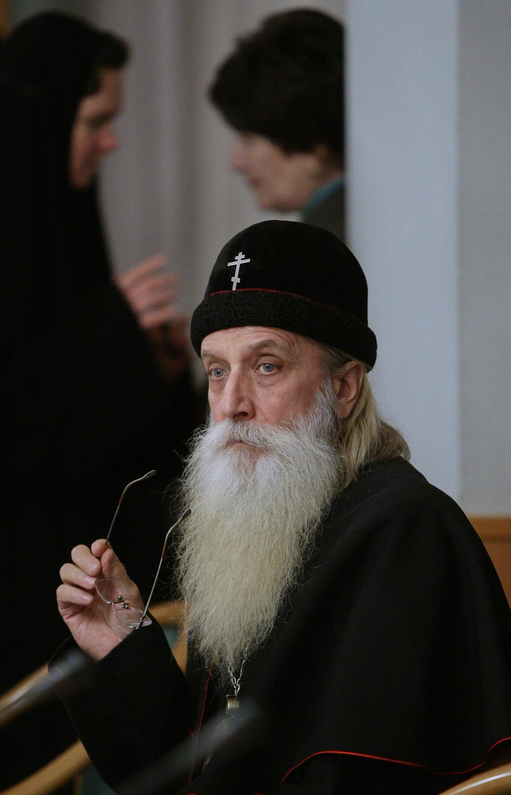 Митрополит Корнилий (Титов) на круглом столе "Новое в законодательстве о религиозных организациях"